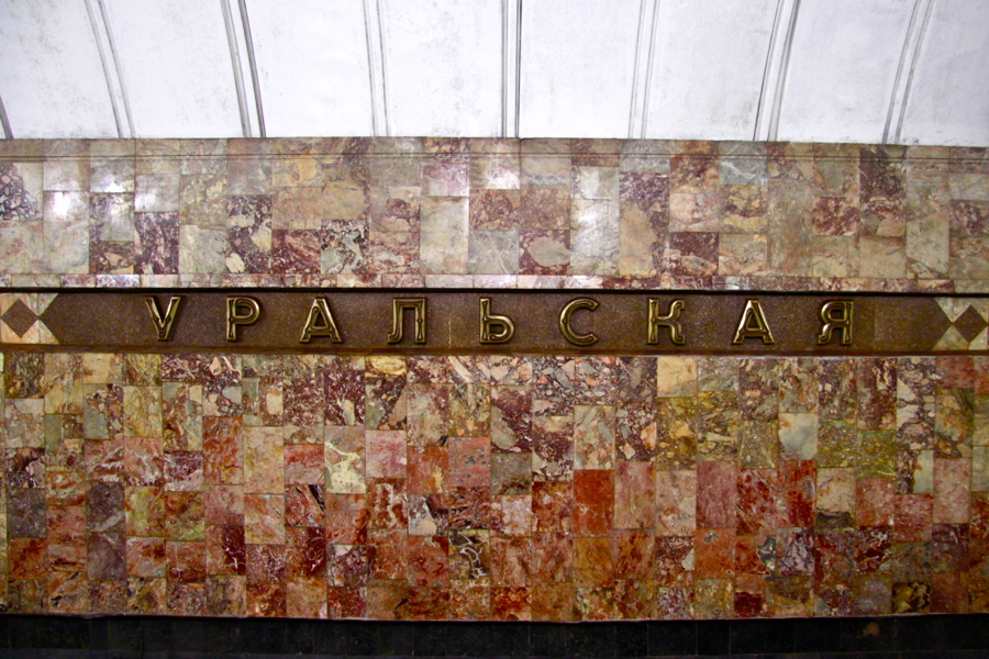 Yekaterinburg Metro (Екатеринбургский метрополитен)